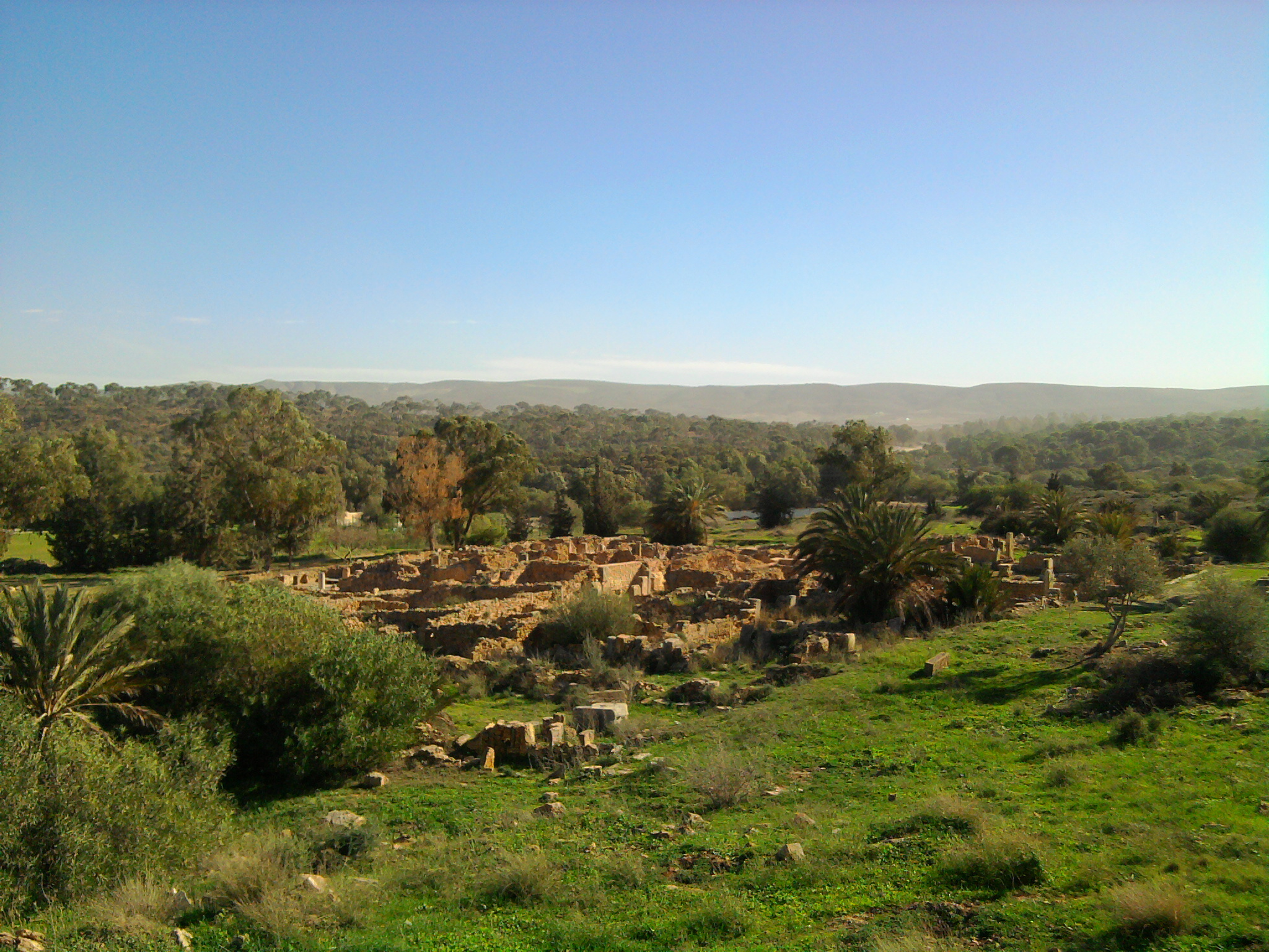 Tunisie, vue sur les ruines de Djebel oust dans les environs de Zaghouan